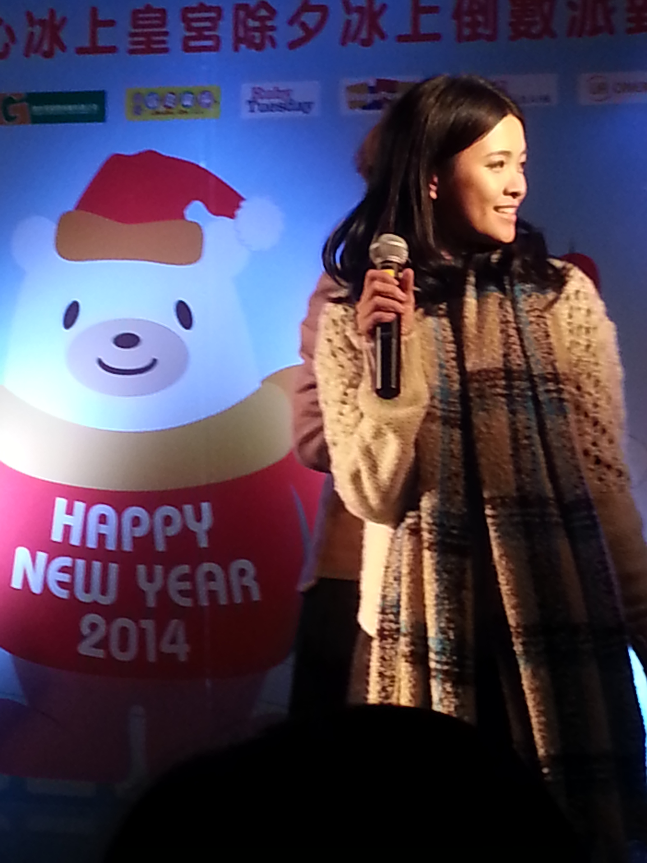 Kaman主持冰上皇宮跨年活動（敏迷族粉絲側拍）